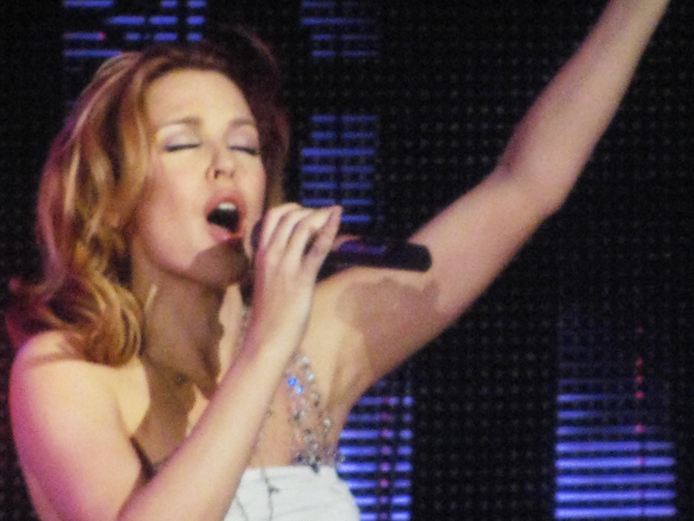 Kylie haciendo un perfomance durante un concierto de la gira For You, For Me Tour